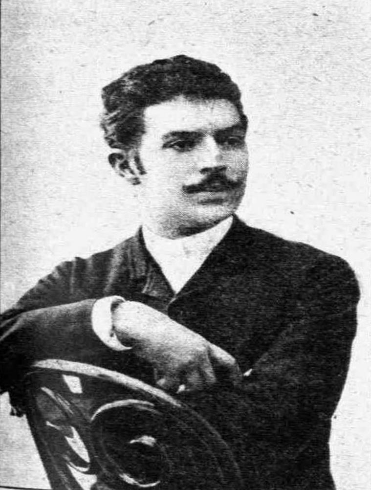 Alexander Philadelpheus, griechischer Schriftsteller, 19. Jahrhundert